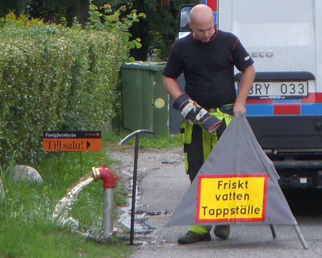 Vattentappställe